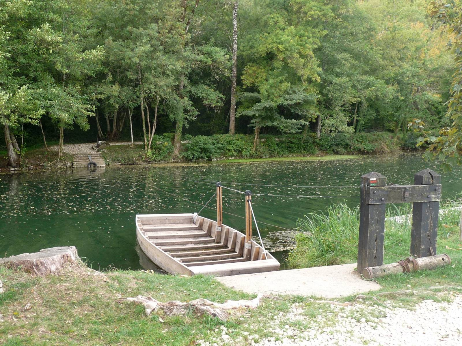 le bac du GR 36 sur la Charente, Lichères, Charente, France